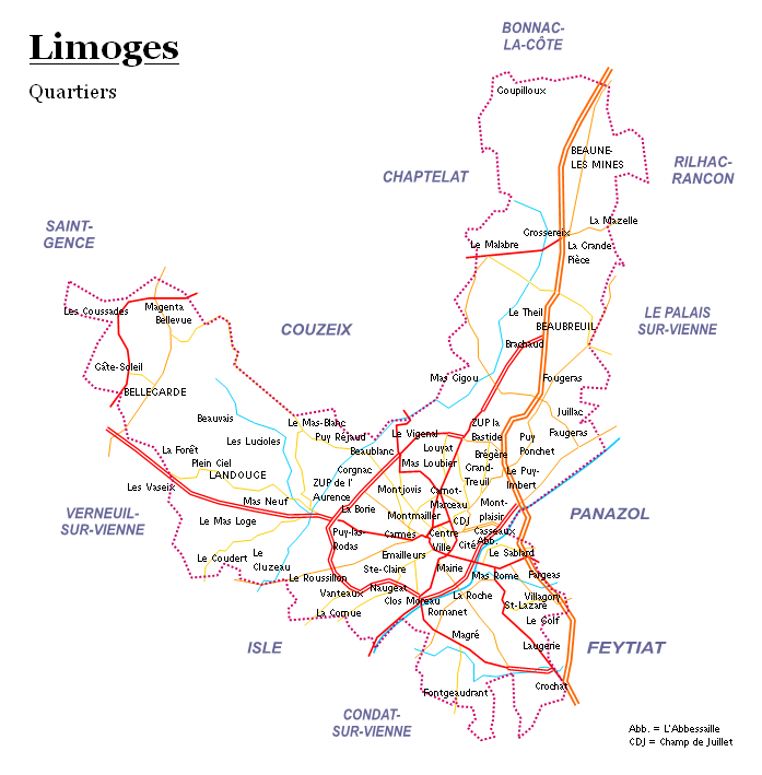 Plan des quartiers et lieux-dits de Limoges, France